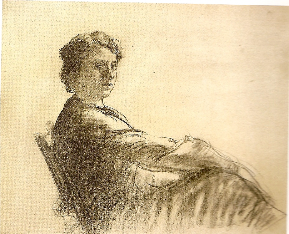 Self-portrait Lluïsa Vidal